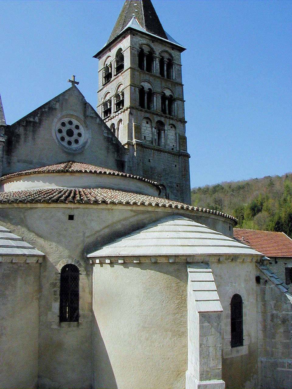 Vignory - Eglise Saint-Etienne - Chevet